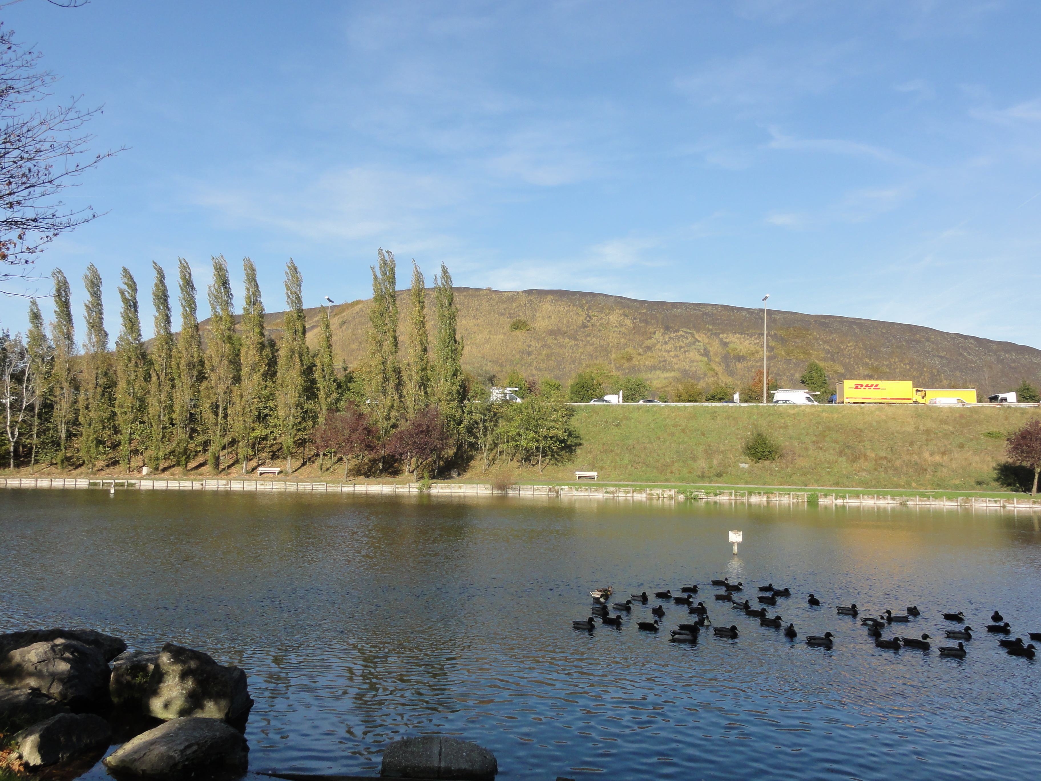 Terrils nos 94 et 94A dits Lavoir de Fouquières, Lavoir de Fouquières du Groupe d'Hénin-Liétard, Noyelles-sous-Lens, Pas-de-Calais, Nord-Pas-de-Calais, France.